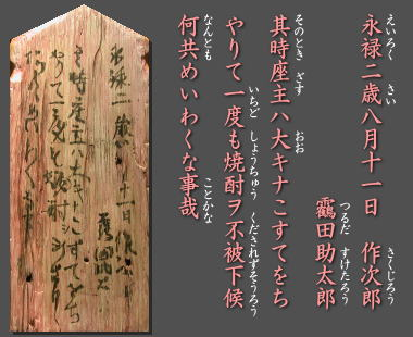 Shochu graffiti at Kōriyama Hachiman shrine in Ōkuchi, Kagoshima